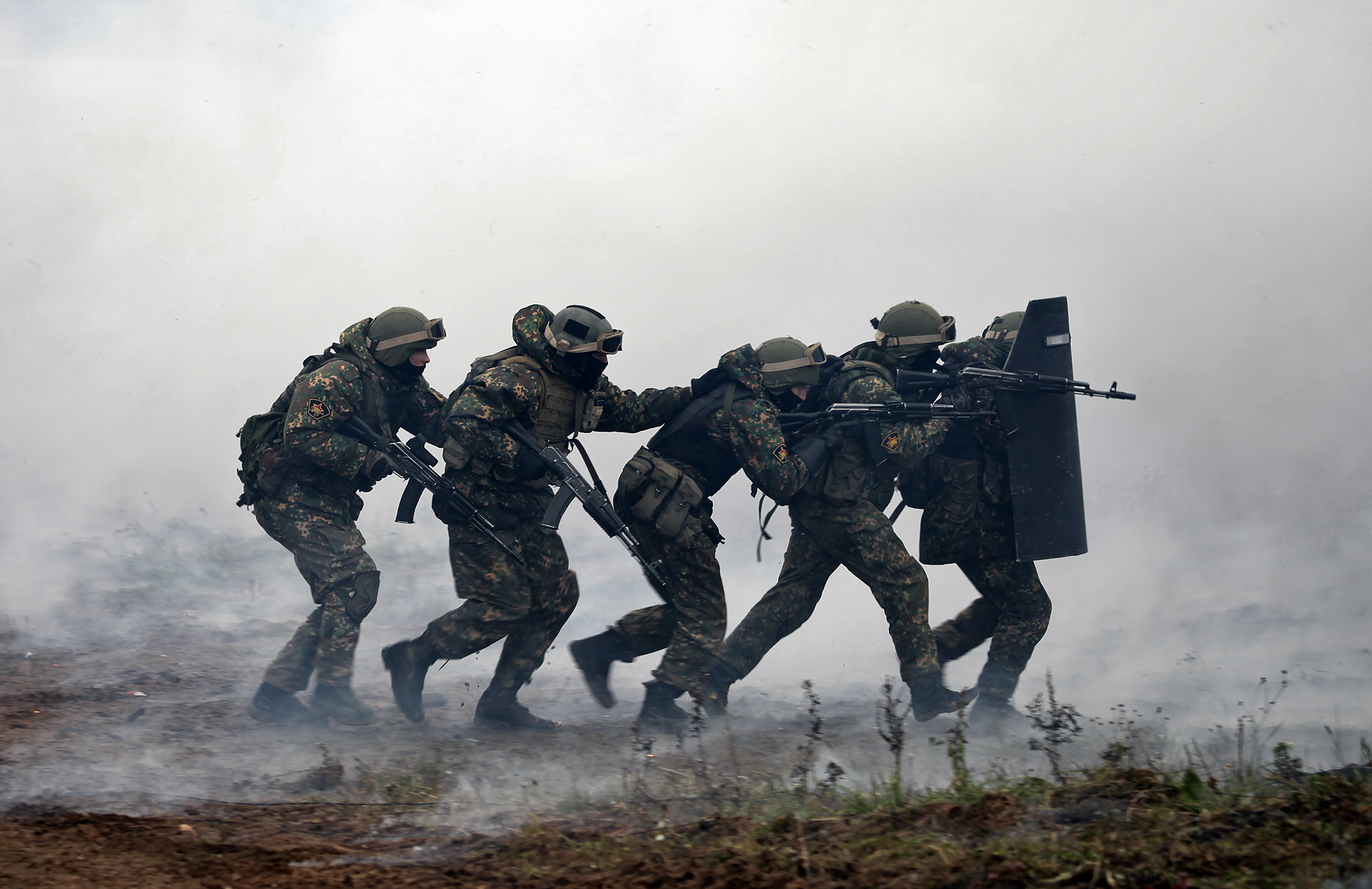 Группа 604-го ЦСН спешилась и готовится к штурму (The group dismounted and prepared to attack)